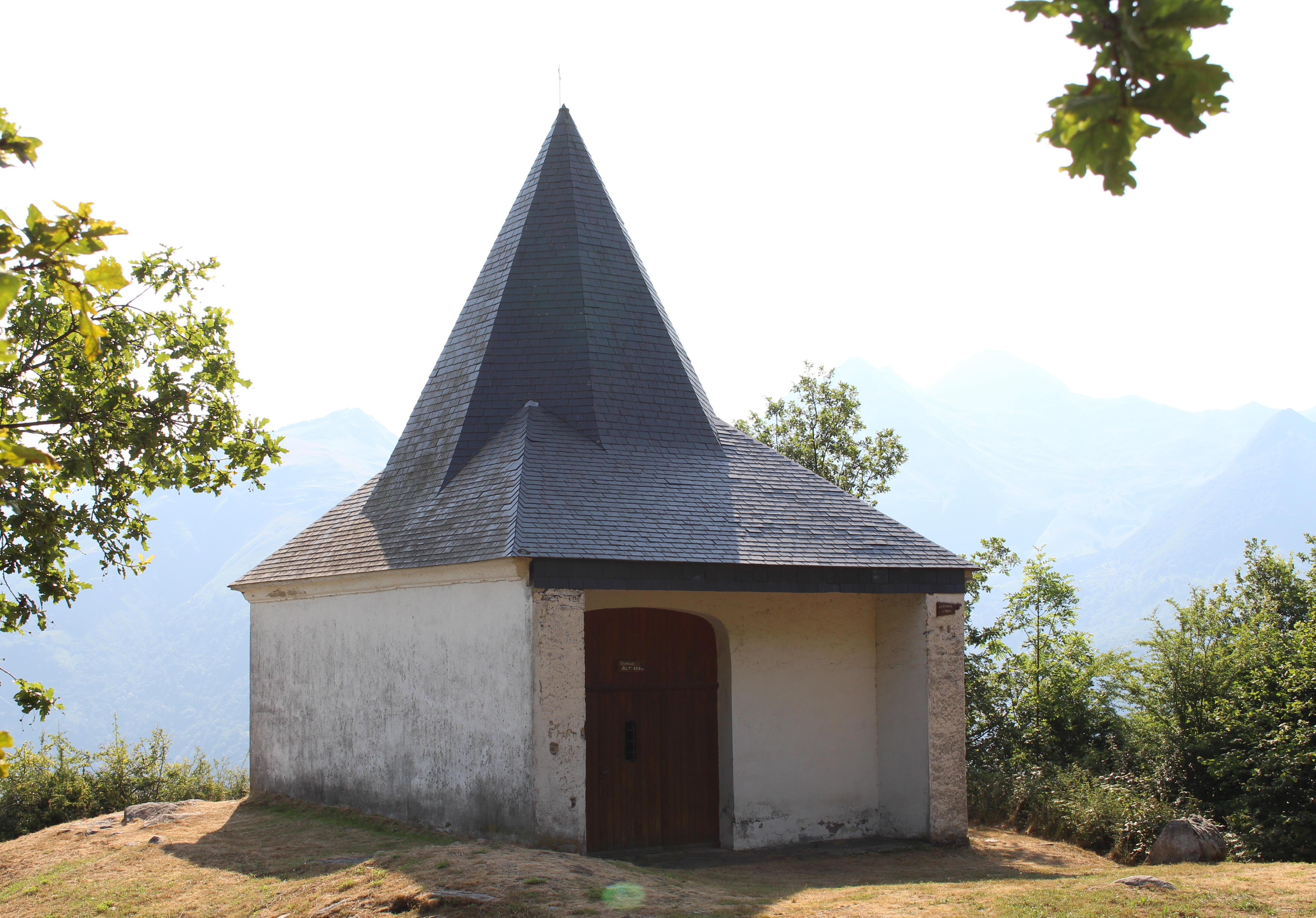 Chapelle Pouyaspé d'Uz (Hautes-Pyrénées)